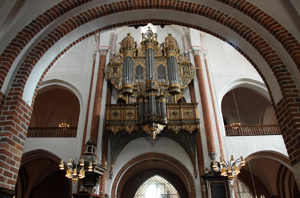 The baroq organ was built in 1554 and reconstructed in 1654. Het barokke orgel is gebouwd in 1554 en in 1654 van een nieuwe kast voorzien.